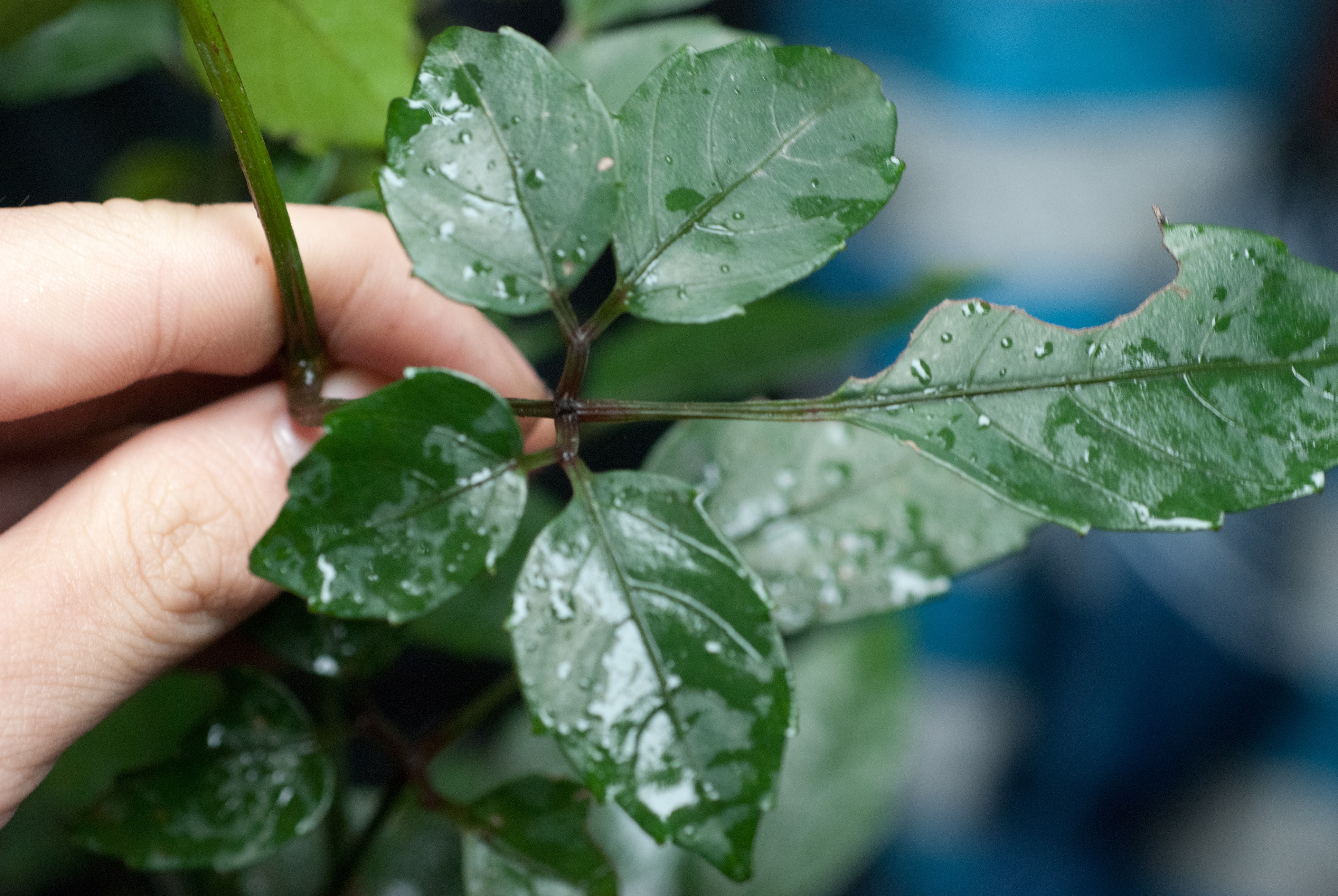 角花烏蘝梅